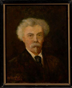 Gerardus Johannes Bos (Leiden, 9 april 1825 - 13 mei 1898) was een Nederlandse kunstschilder, etser, lithograaf en steendrukker. Zelfportret 19e eeuw. Collectie Museum De Lakenhal S 39.